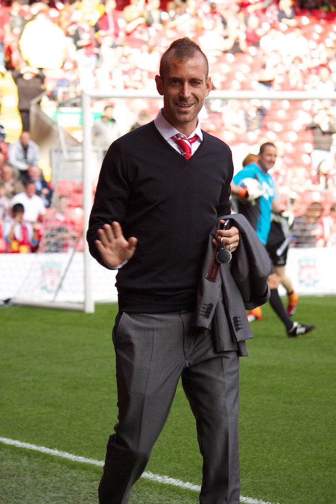 Liverpool vs Bolton 27/08/2011